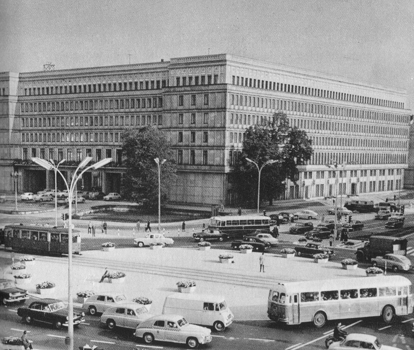 Gmach Komitetu Centralnego Polskiej Zjednoczonej Partii Robotniczej w Warszawie